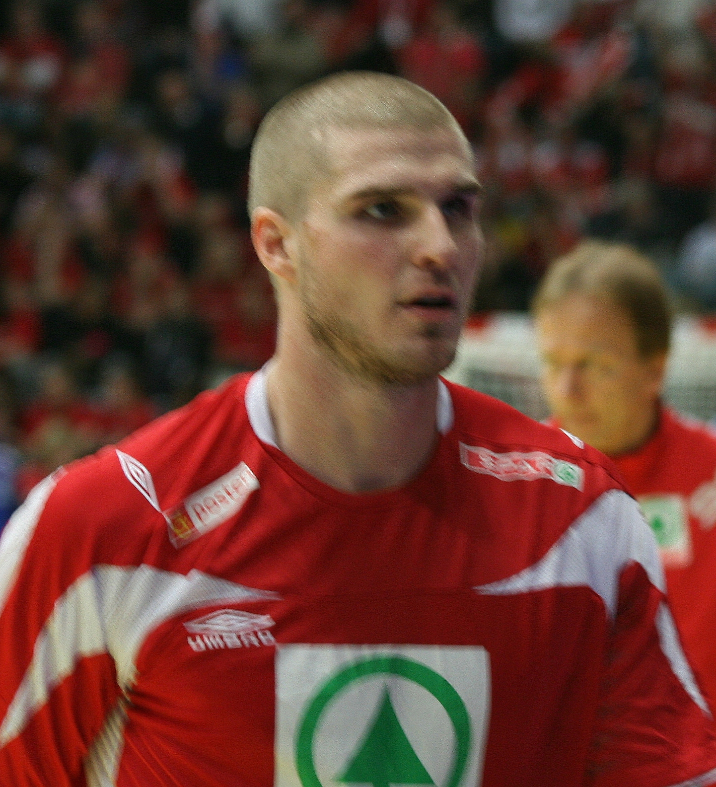 Bjarte Myrhol, Norwegian handballer, in Stavanger